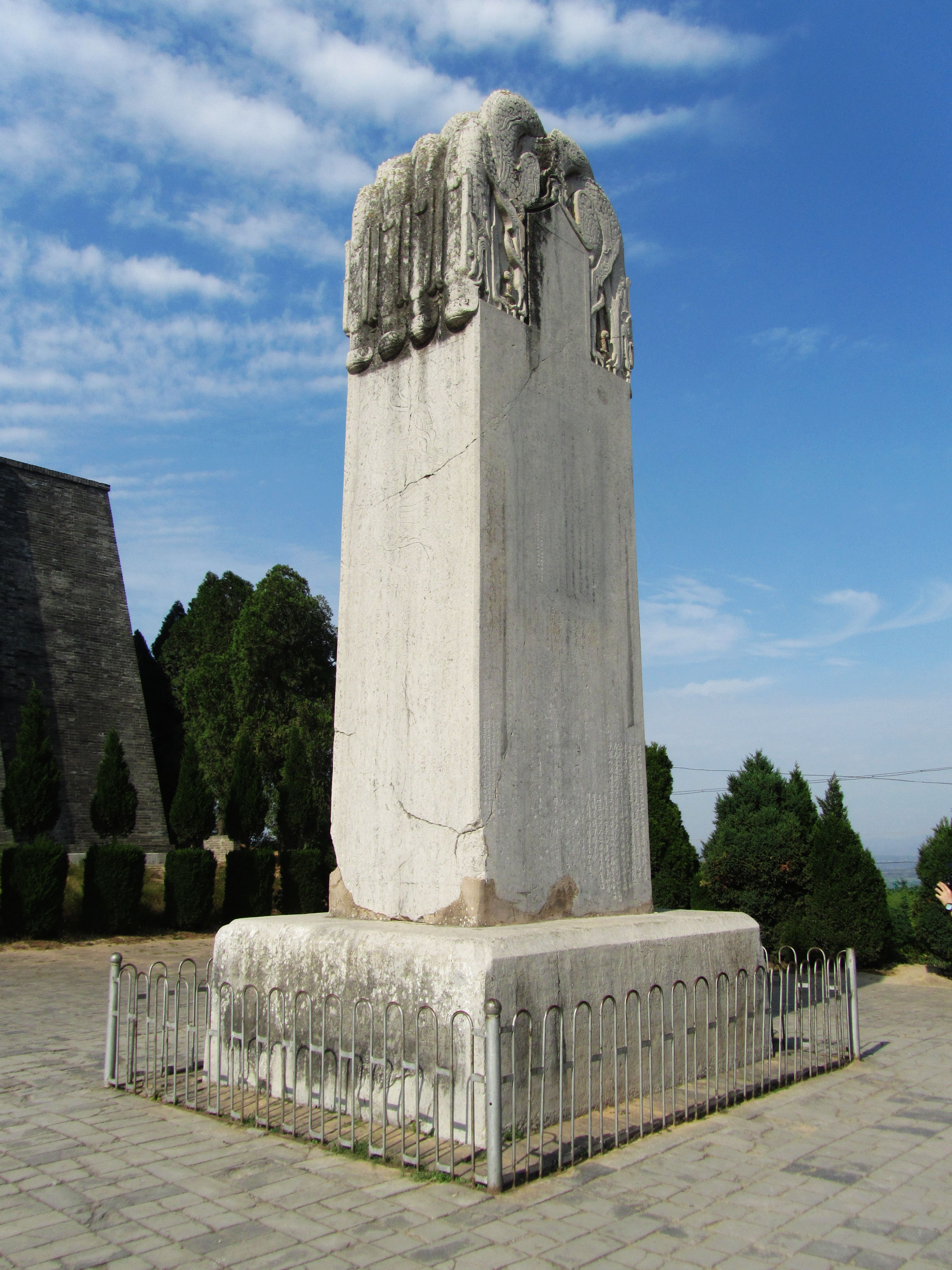 乾陵无字碑，西南面。